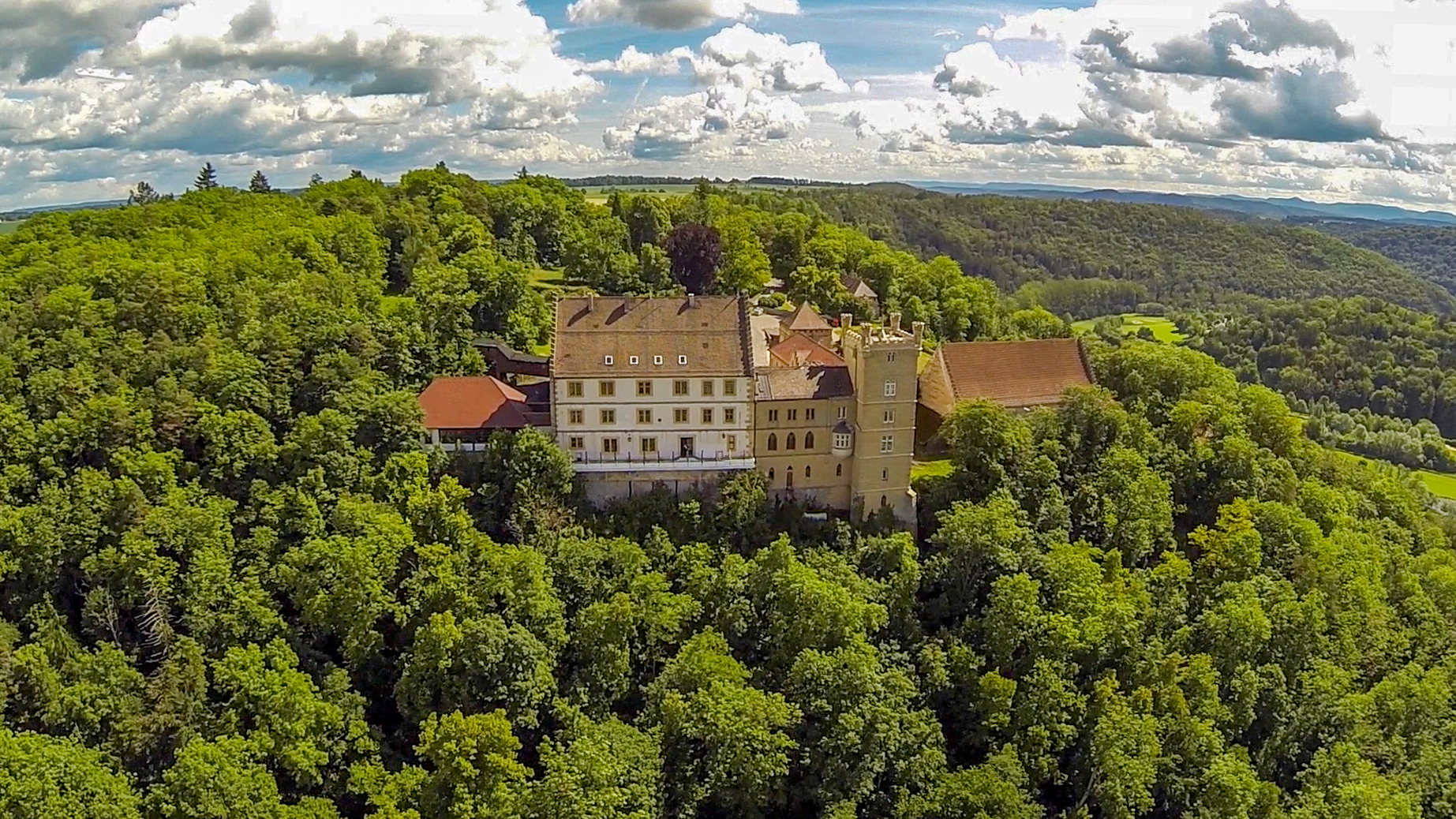 Schloss Weitenburg Luftaufnahme